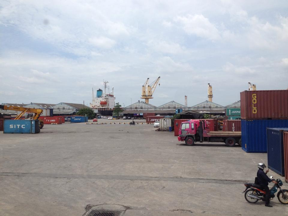 ท่าเรือกรุงเทพ